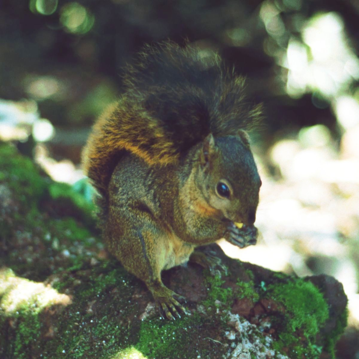 Mittelamerikanisches Berghörnchen (Syntheosciurus brochus), Sciuridae - Costa Rica, Cordillera Central, Volcán Poás, beim alten Kratersee (Laguna Botos)